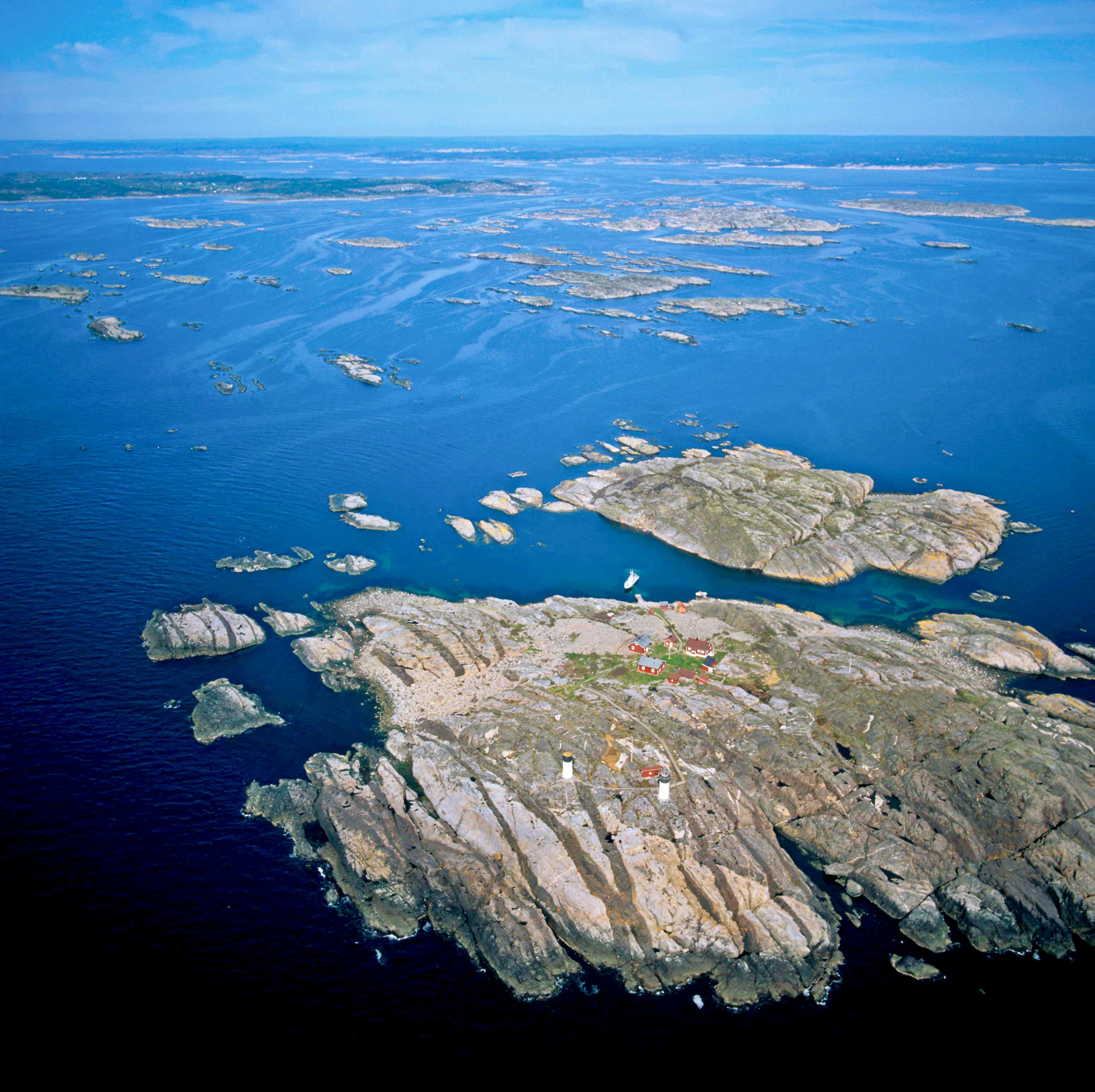 Paragneis sedimentario (roca gris claro) intruida por dos generaciones de diques de color oscuro. Primero por gabro y luego por diabasa. Entre estos dos episodios de intrusion también se puede ver una pequeño dique de pegmatita (de color claro) cerca del faro. Imagen de las Islas Koster en Suecia.